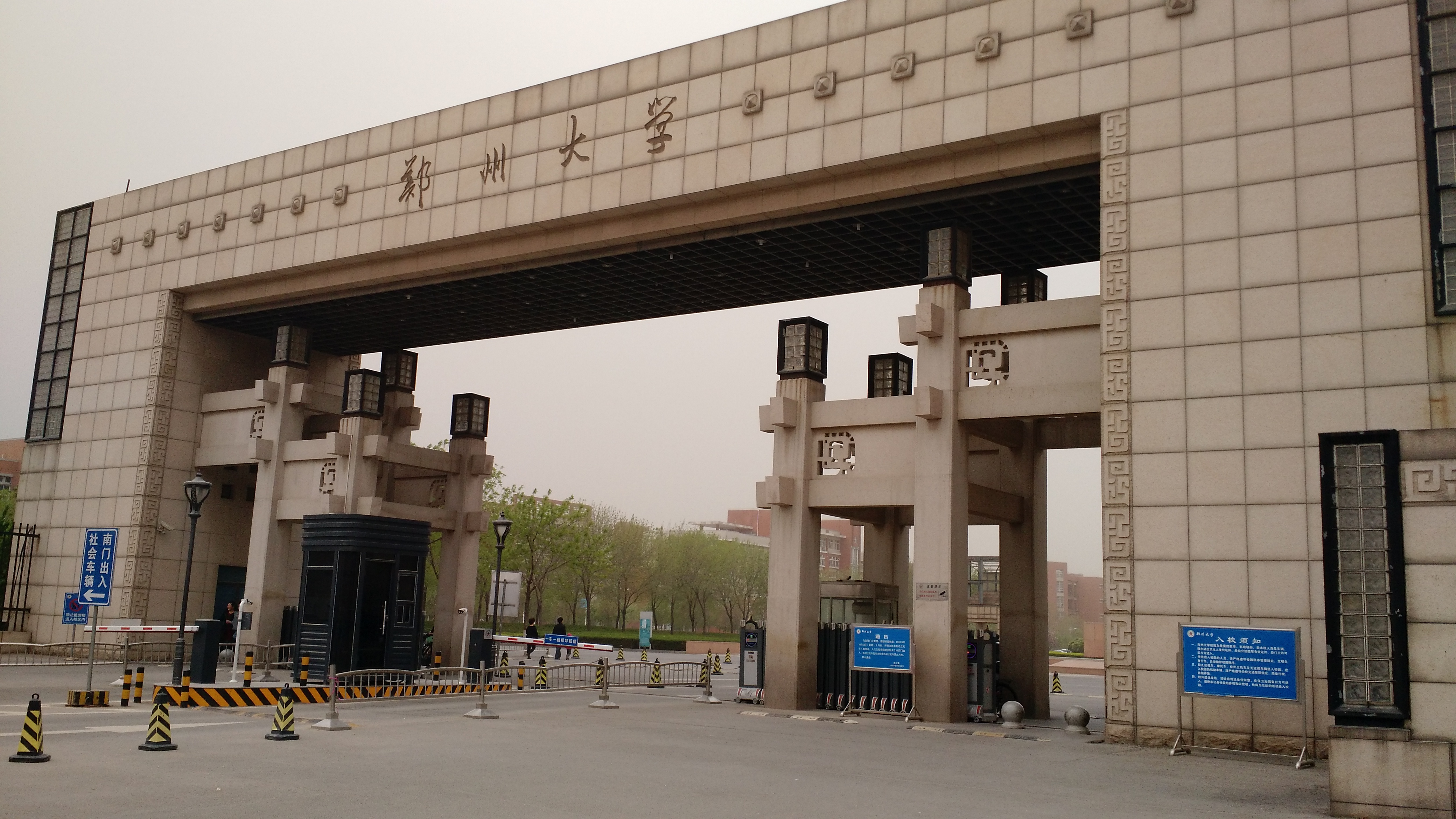 郑州大学大门